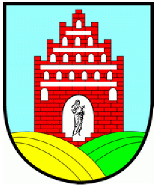 Herb gminy Miłoradz, woj. pomorskie